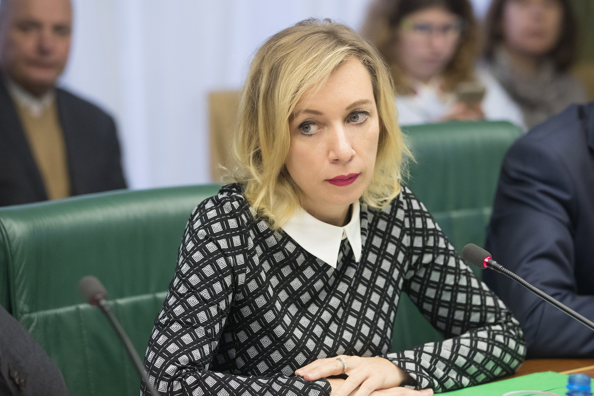 Мария Захарова — директор департамента информации и печати МИД РФ в Совете Федерации